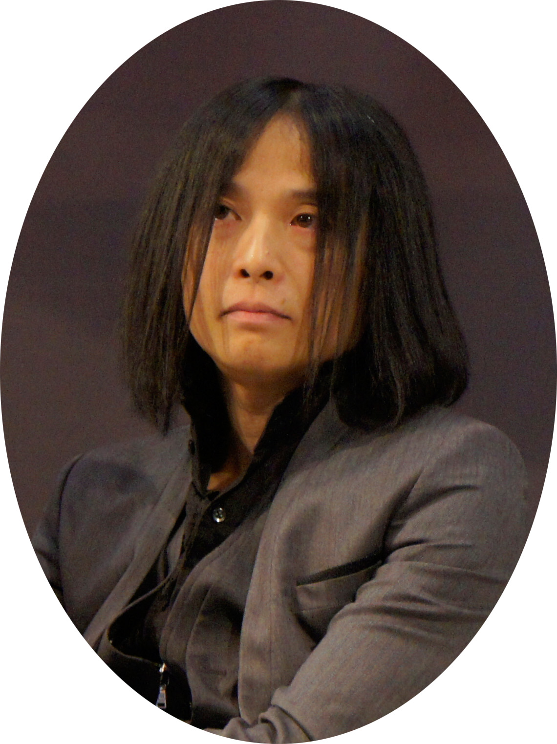 Hitonari Tsuji au salon du Livre 2012.